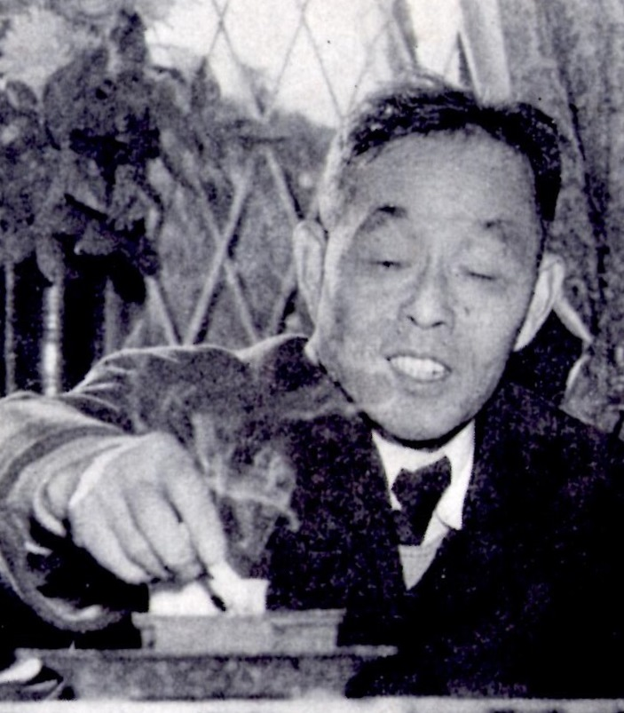 正宗白鳥『作家論･上』（昭和26年刊、創元文庫）